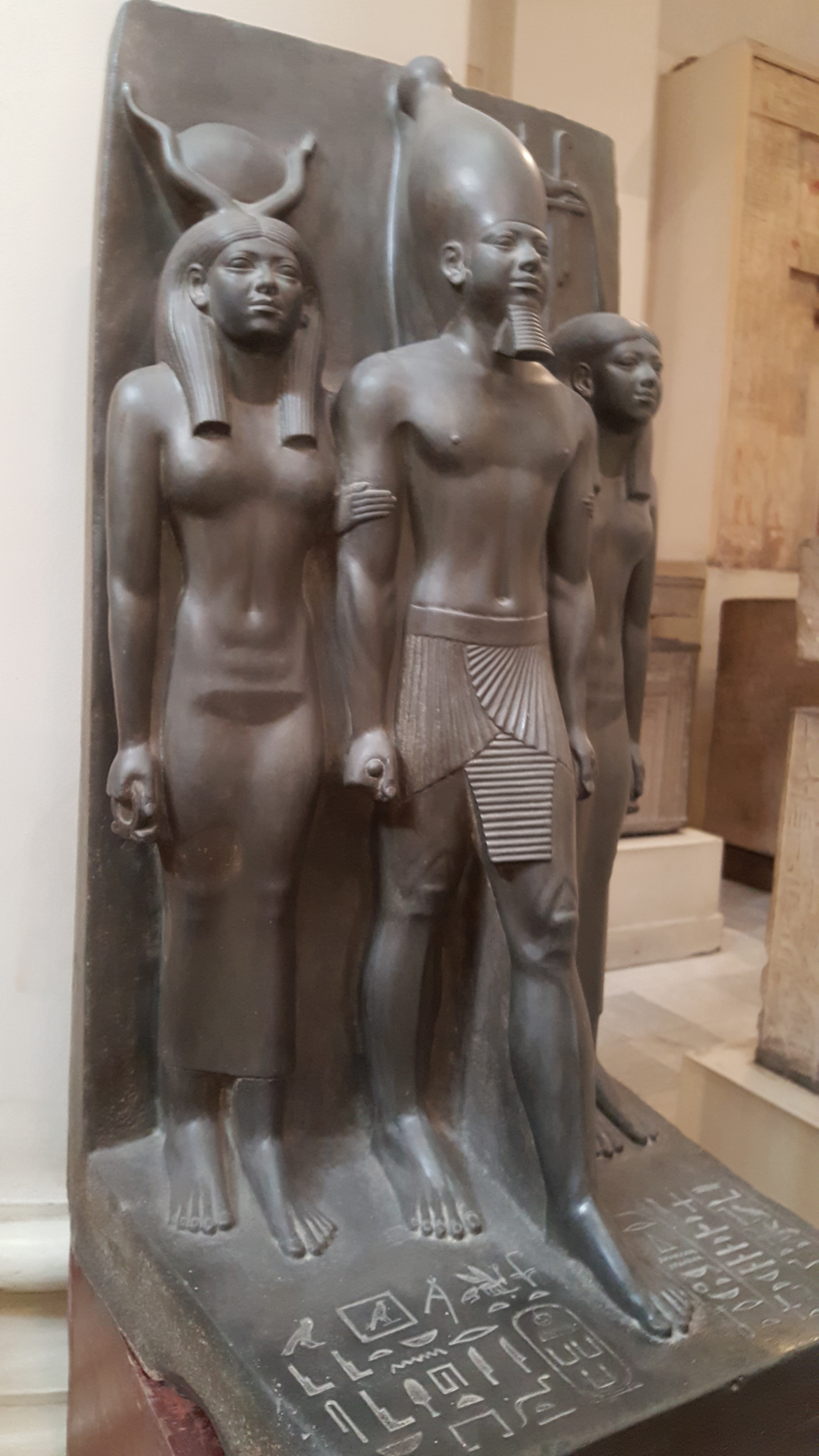 Egyptian Museum (Cairo)